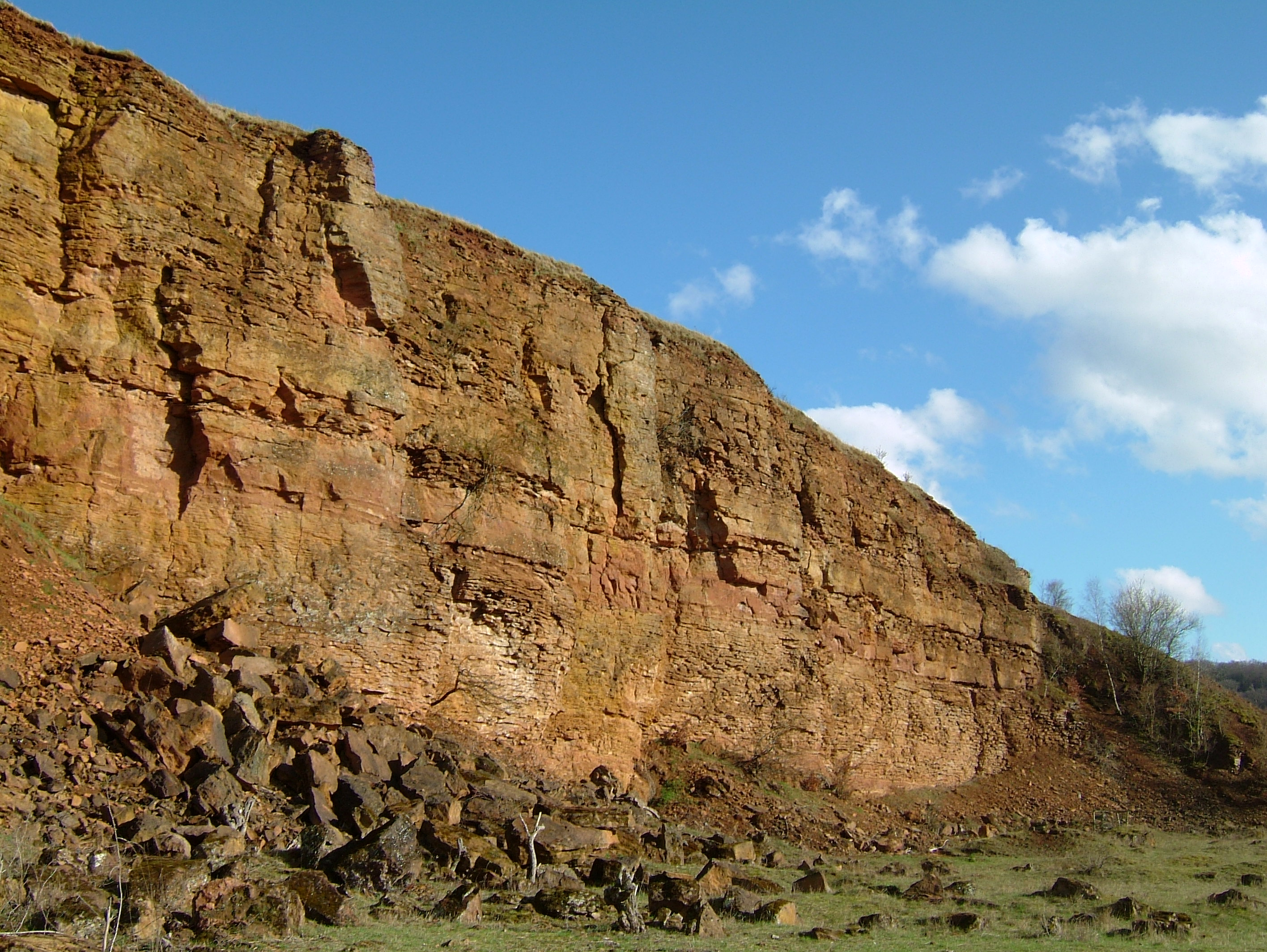 Géi Ofbaufront zu Téiteng um Hesselsbierg.